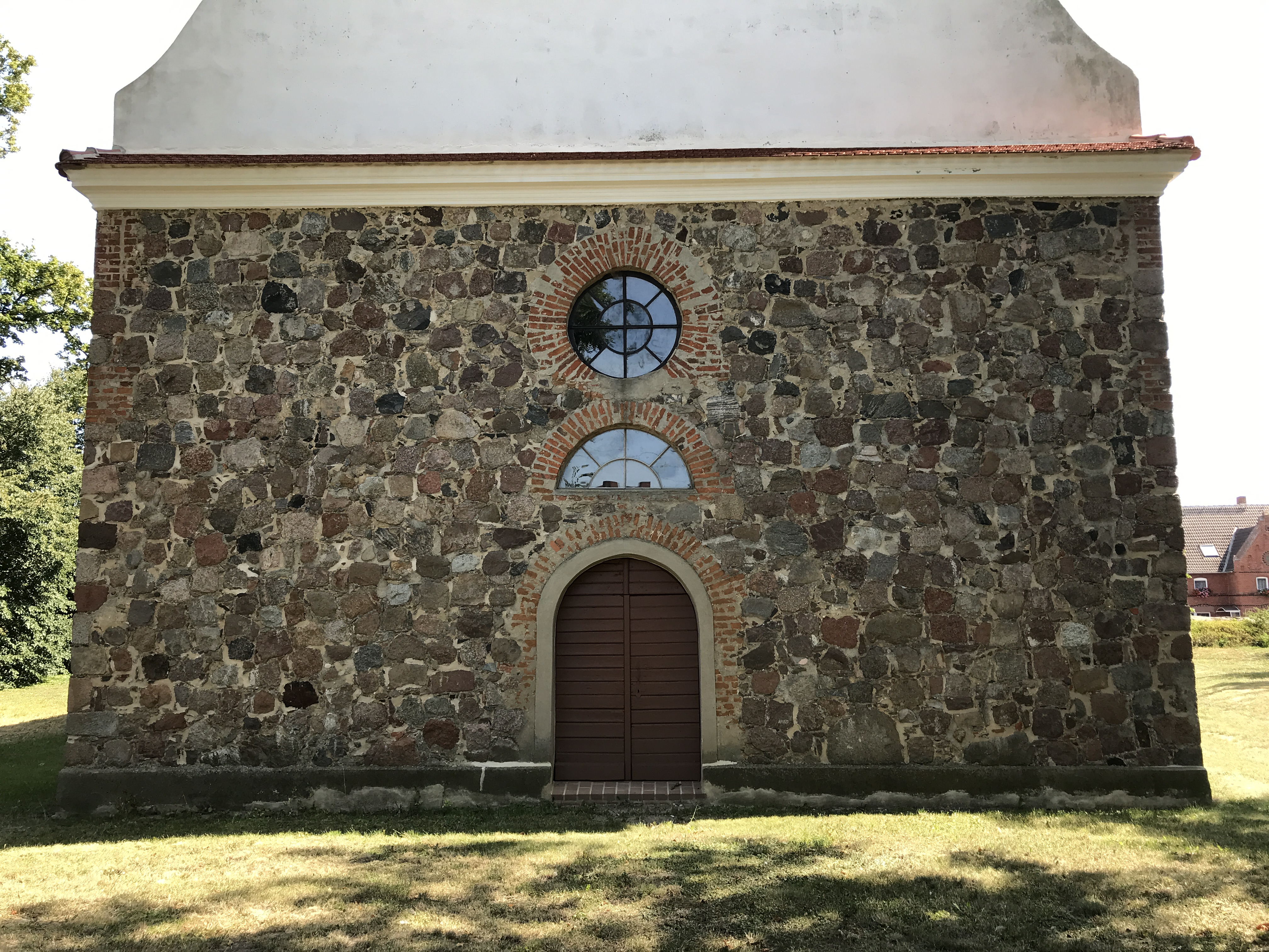 Die Dorfkirche Wismar im gleichnamigen Ortsteil der Gemeinde Uckerland im Landkreis Uckermark ist eine Feldsteinkirche aus dem 13. Jahrhundert. Im Innenraum steht unter anderem ein Kanzelalter aus dem 18. Jahrhundert.